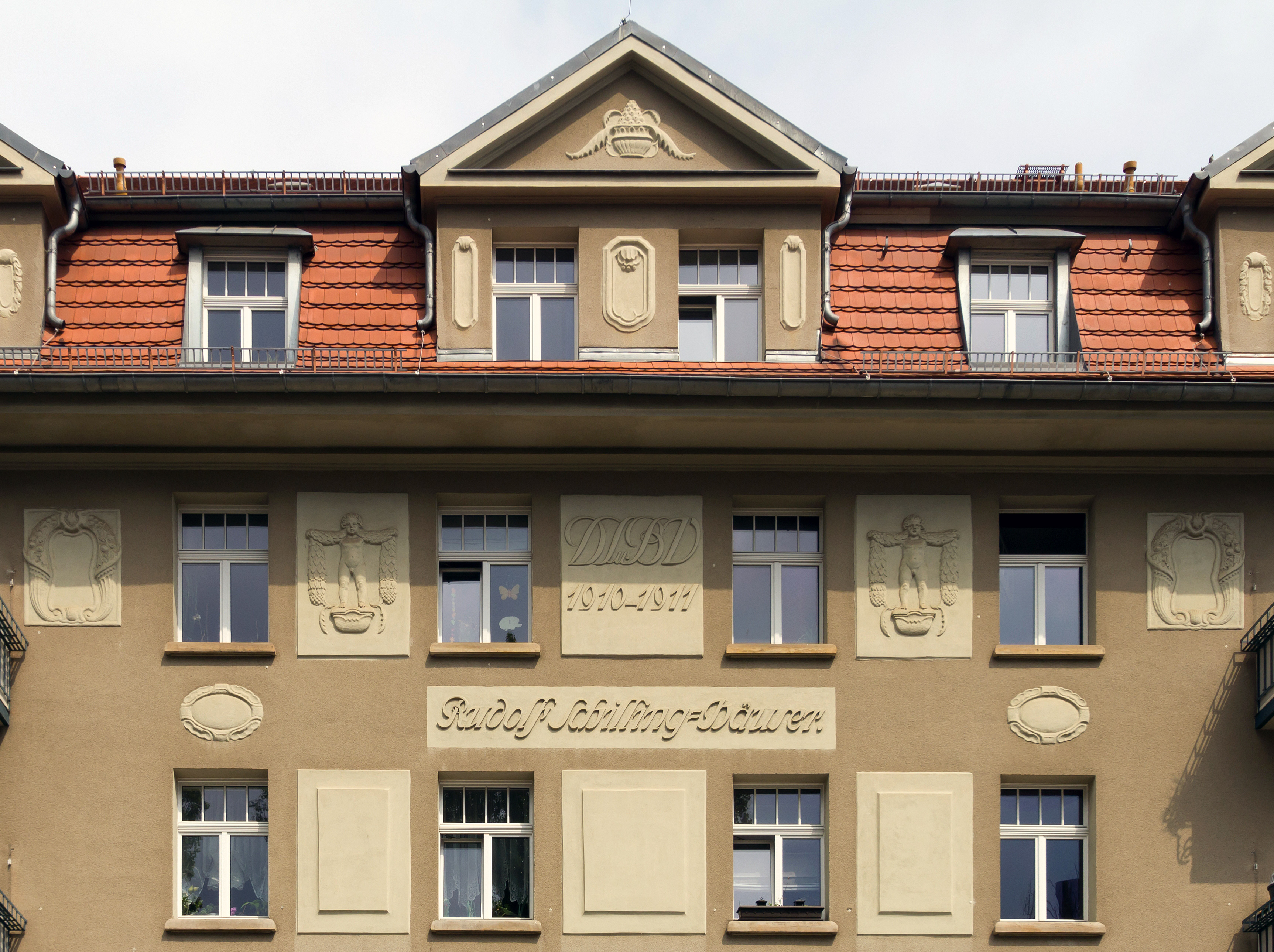 Rudolf-Schilling-Häuser, Dresden